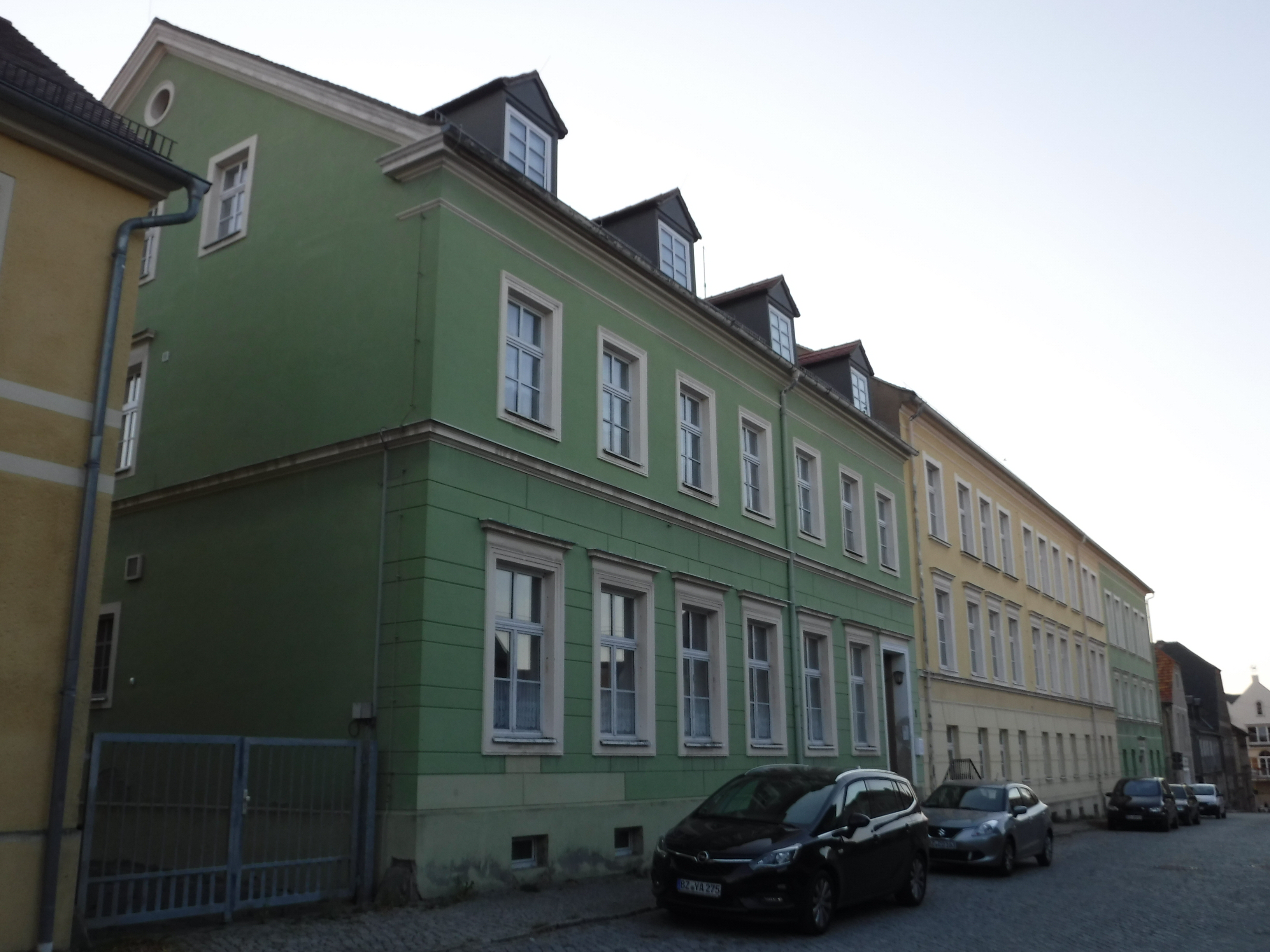 Zinzendorfstraße 1: Komplex aus drei Wohnhäusern / Mädchenhaus 1860 Einzeldenkmal der Sachgesamtheit Kolonie Kleinwelka; spätklassizistische Putzfassaden, baugeschichtlich und straßenbildprägend von Bedeutung, dreigeschossig